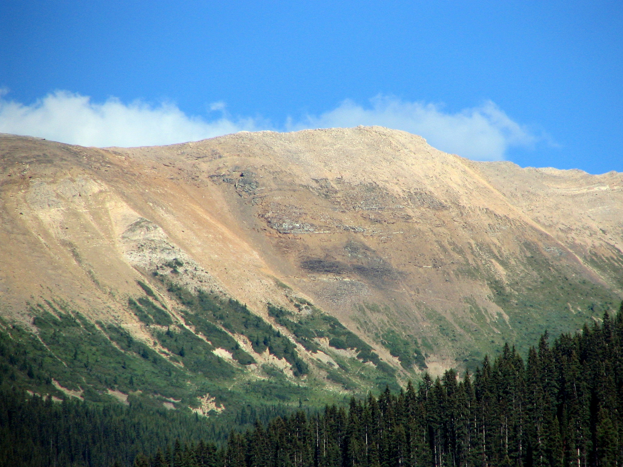 Yacimientos de los esquistos de Burgess visto desde el lago Esmeralda. Patrimonio de la Humanidad